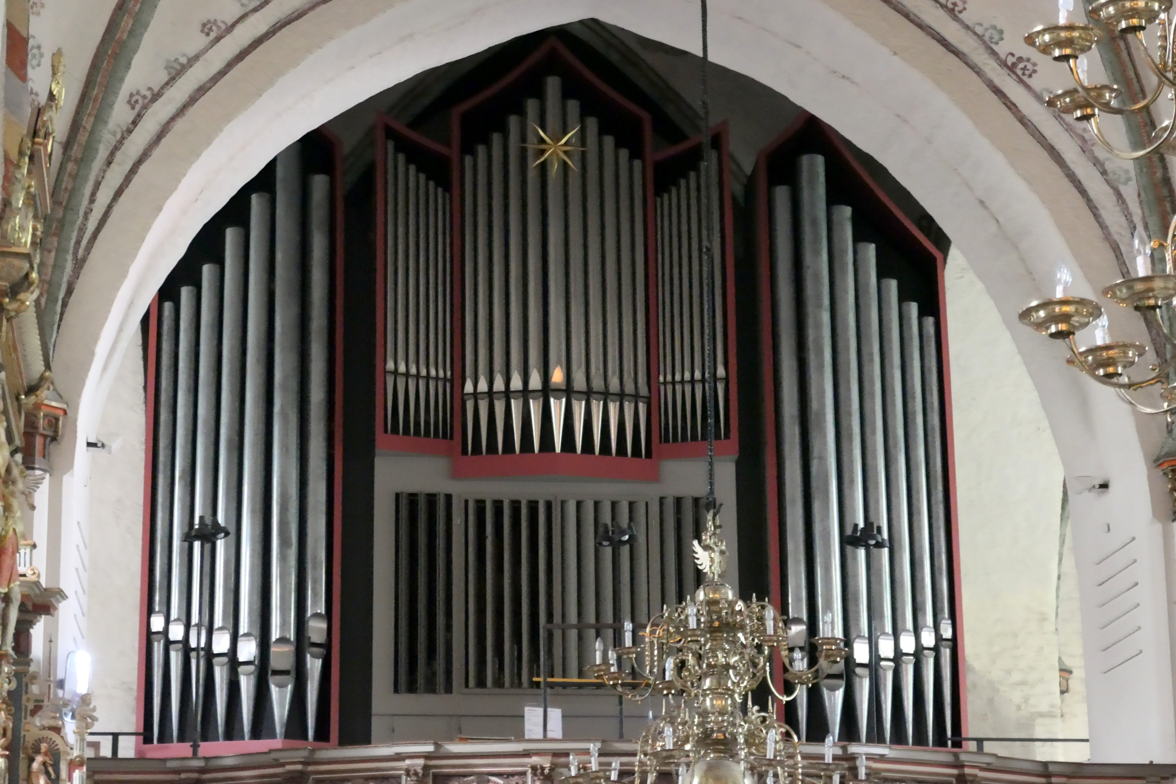 Orgel der Marienkirche Rendsburg, Kreis Rendsburg-Eckernförde, Schleswig-Holstein, Deutschland